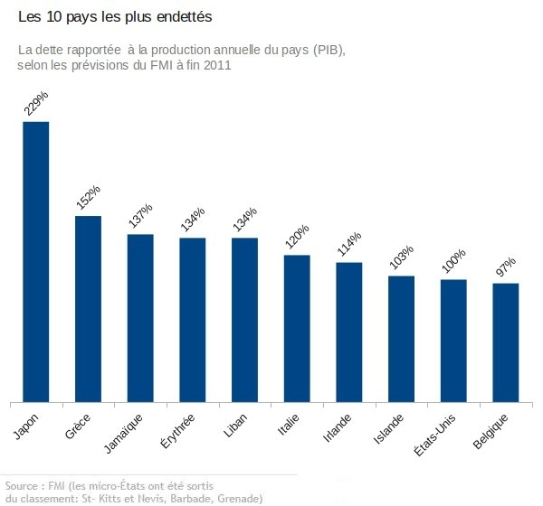 Dettes souveraines rapportées au PIB des 10 pays les plus endettés - prévisions du FMI à fin 2011